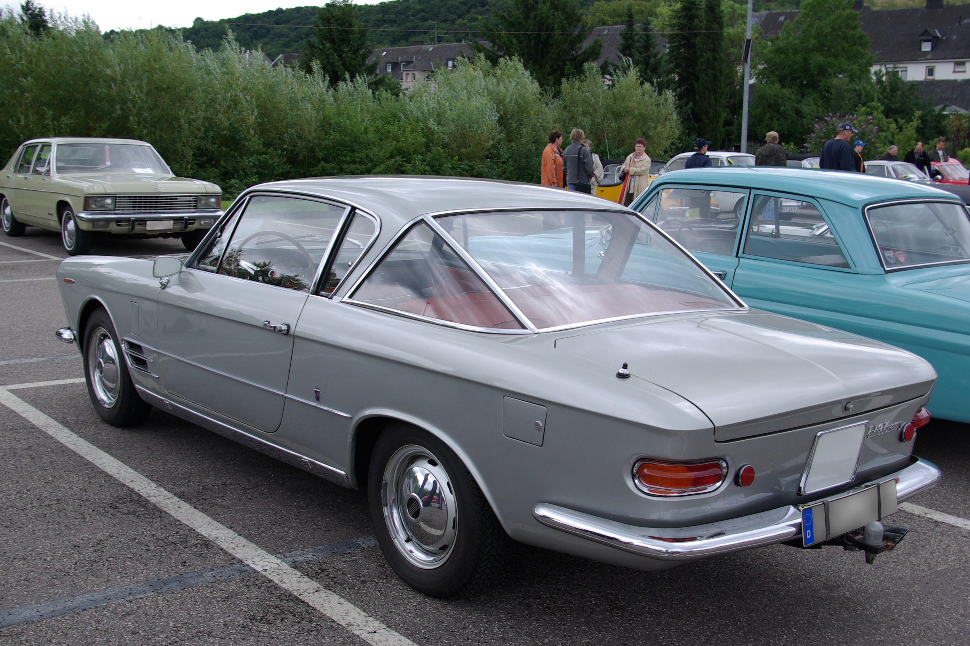 Fiat 2300 S Coupé, Baujahr 1965, 136 PS , aufgenommen bei / photographed at "25. Internationales Konzer Oldtimer-Treffen", 19. Juli 2009